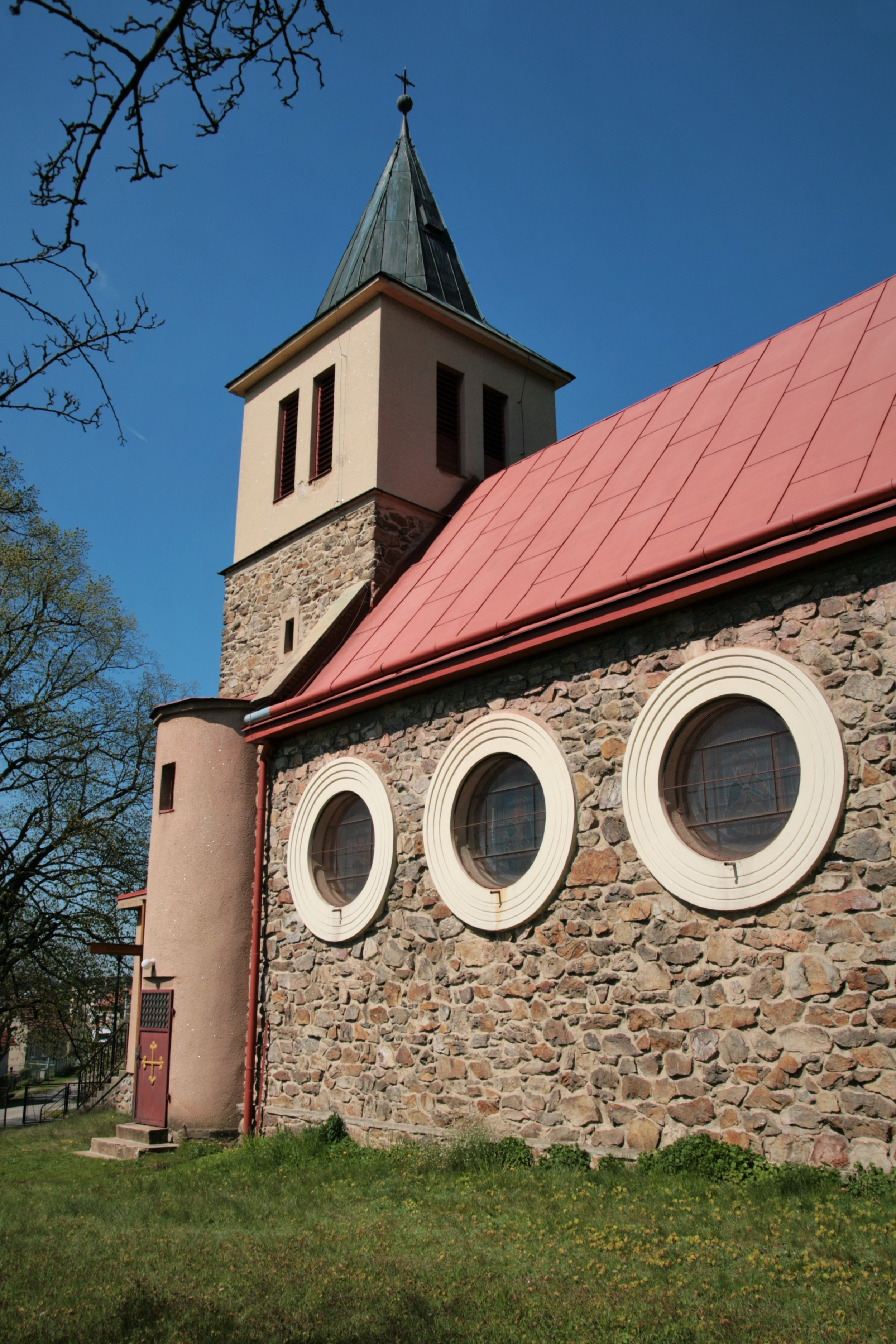 Kuřimská Nová Ves v okrese Brno-venkov. Boční strana kostela sv. Antonína Paduánského od severovýchodu.